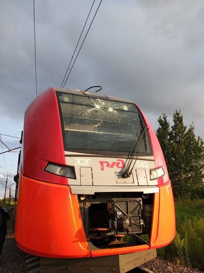 Электропоезд ЭС2Г-043 после аварии межу станциями Чкаловск и Сельма, 16 августа 2018 года